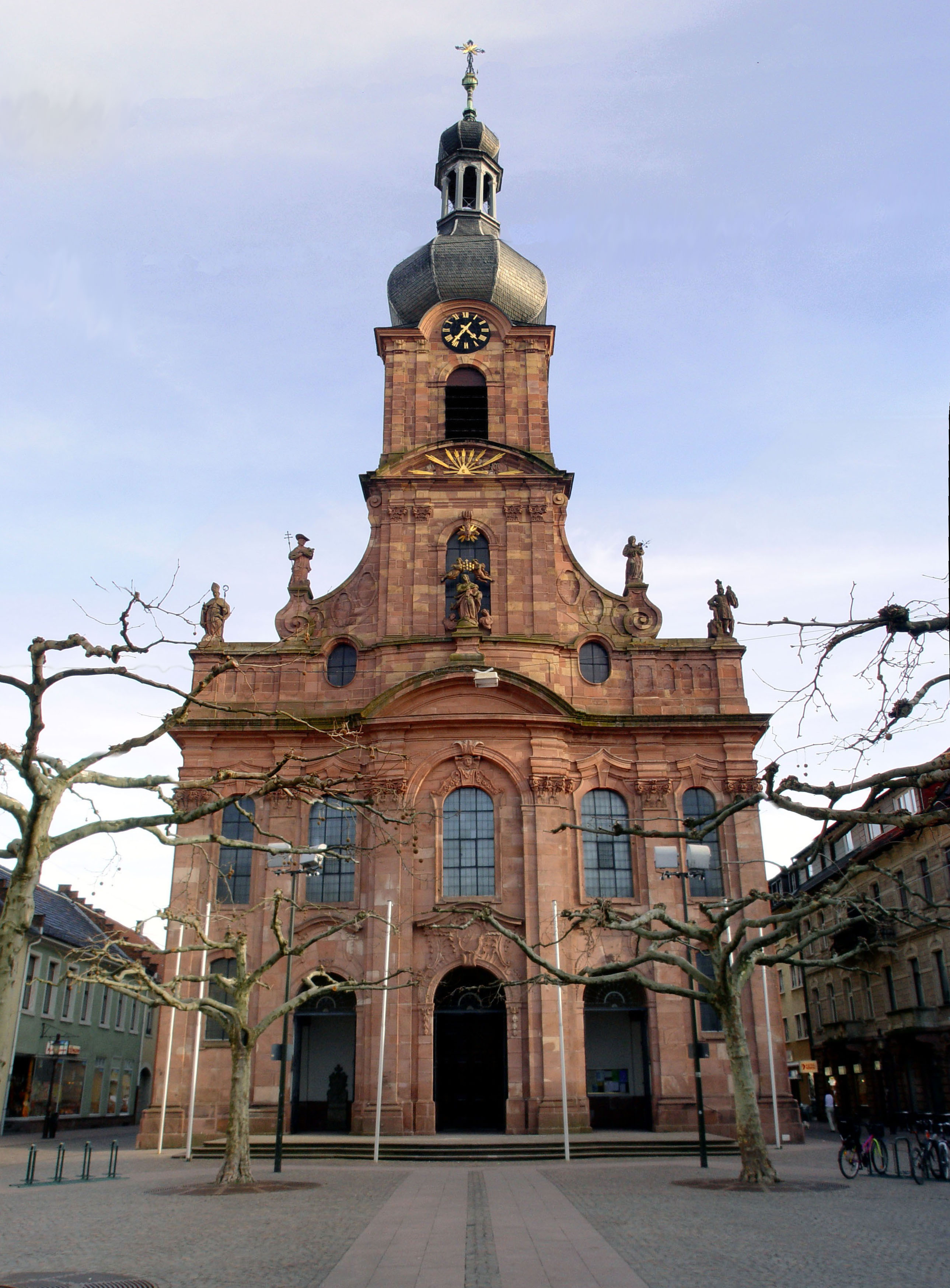 Fotografiert von Martin Dürrschnabel Stadtkirche St. Alexander in Rastatt.